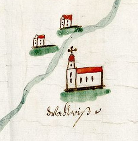 Deutschland (D) - Baden-Württemberg (BW) - Landkreis Konstanz (KN) - Stockach-Wahlwies